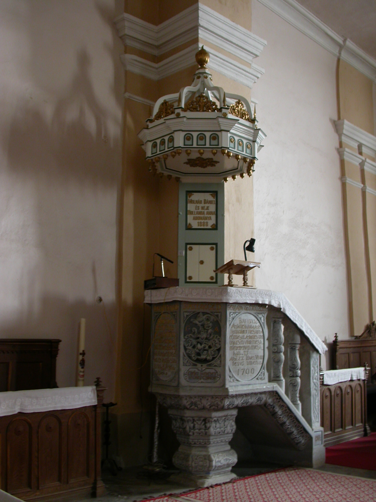 Ansamblul bisericii reformate, sec. XIV - XIX